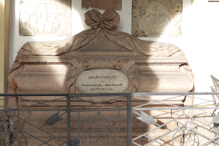 Sebastiansfriedhof (Grabplatte der Gutrater)